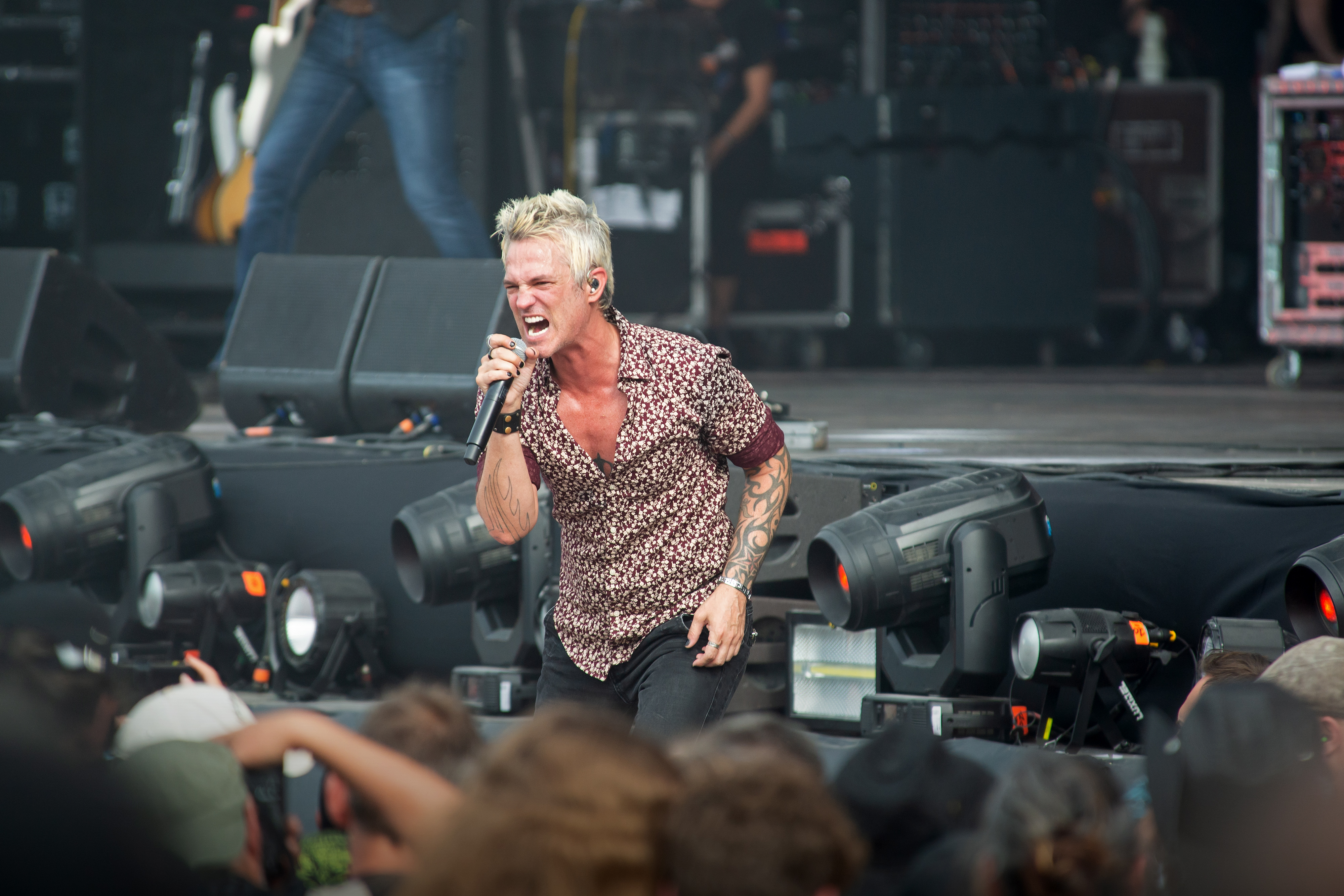 Concert du groupe Stone Temple Pilots au Hellfest 2019.